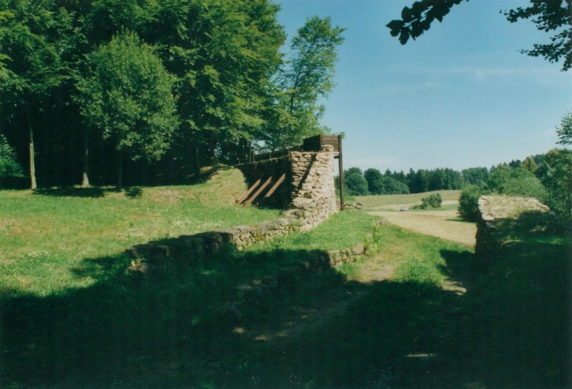 Heunischenburg near Kronach, Bavaria, Germany (interior view, Heuni).